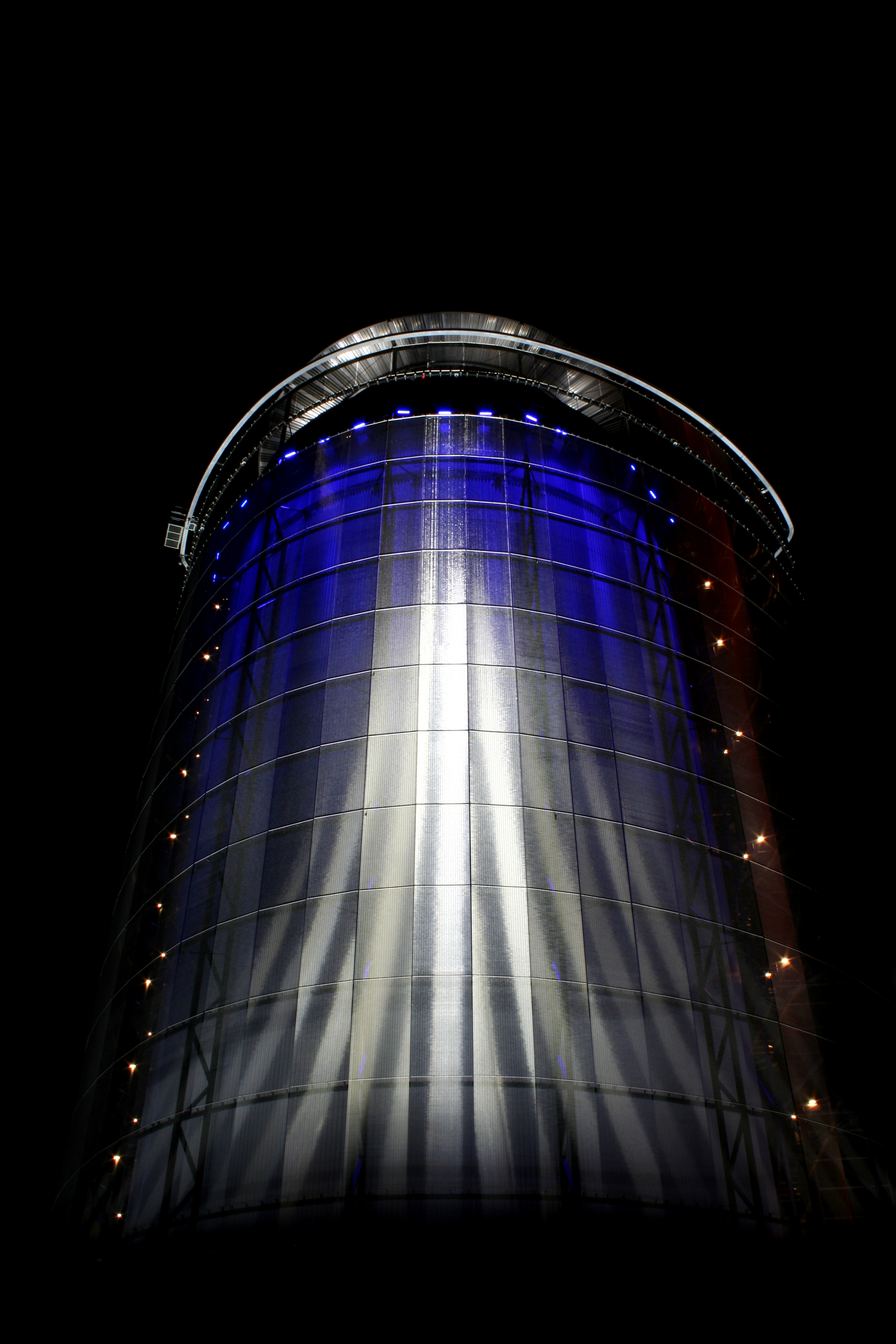 Arctura på natten.